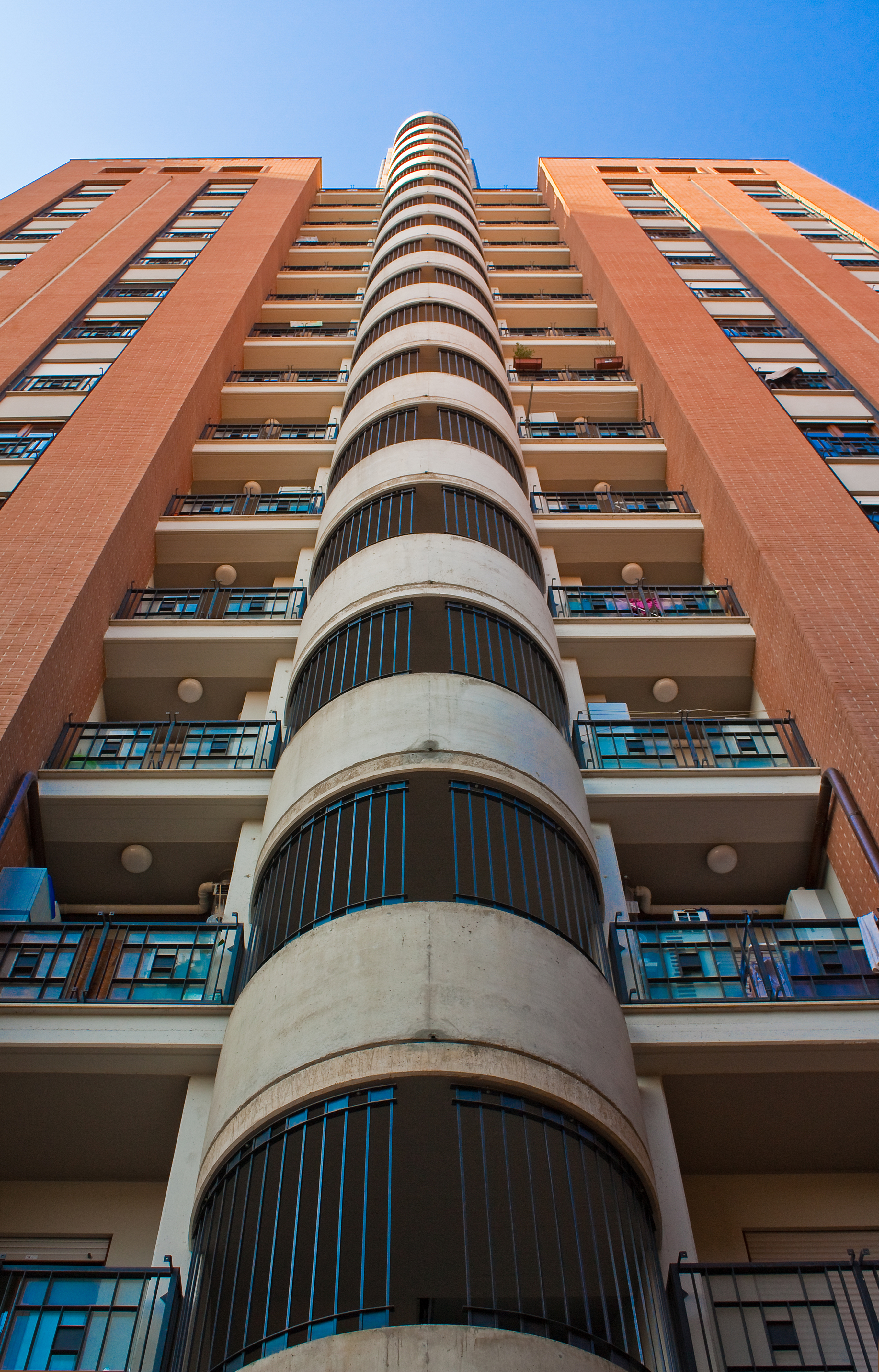 Grattacielo in Via Giandimartalo di Vitalone.